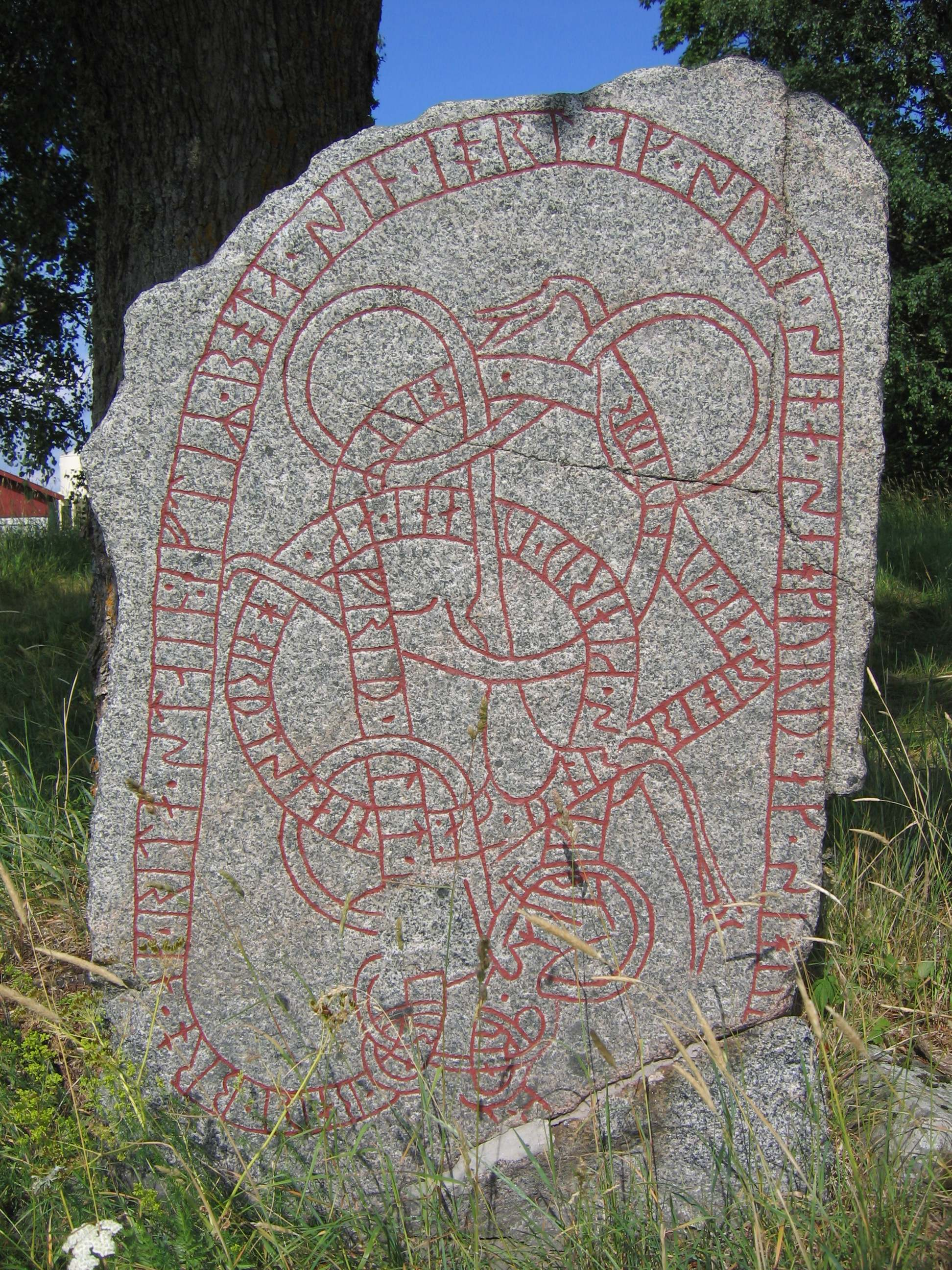 Upplands runinskrifter 854, Prästgården, Balingsta socken, Uppland